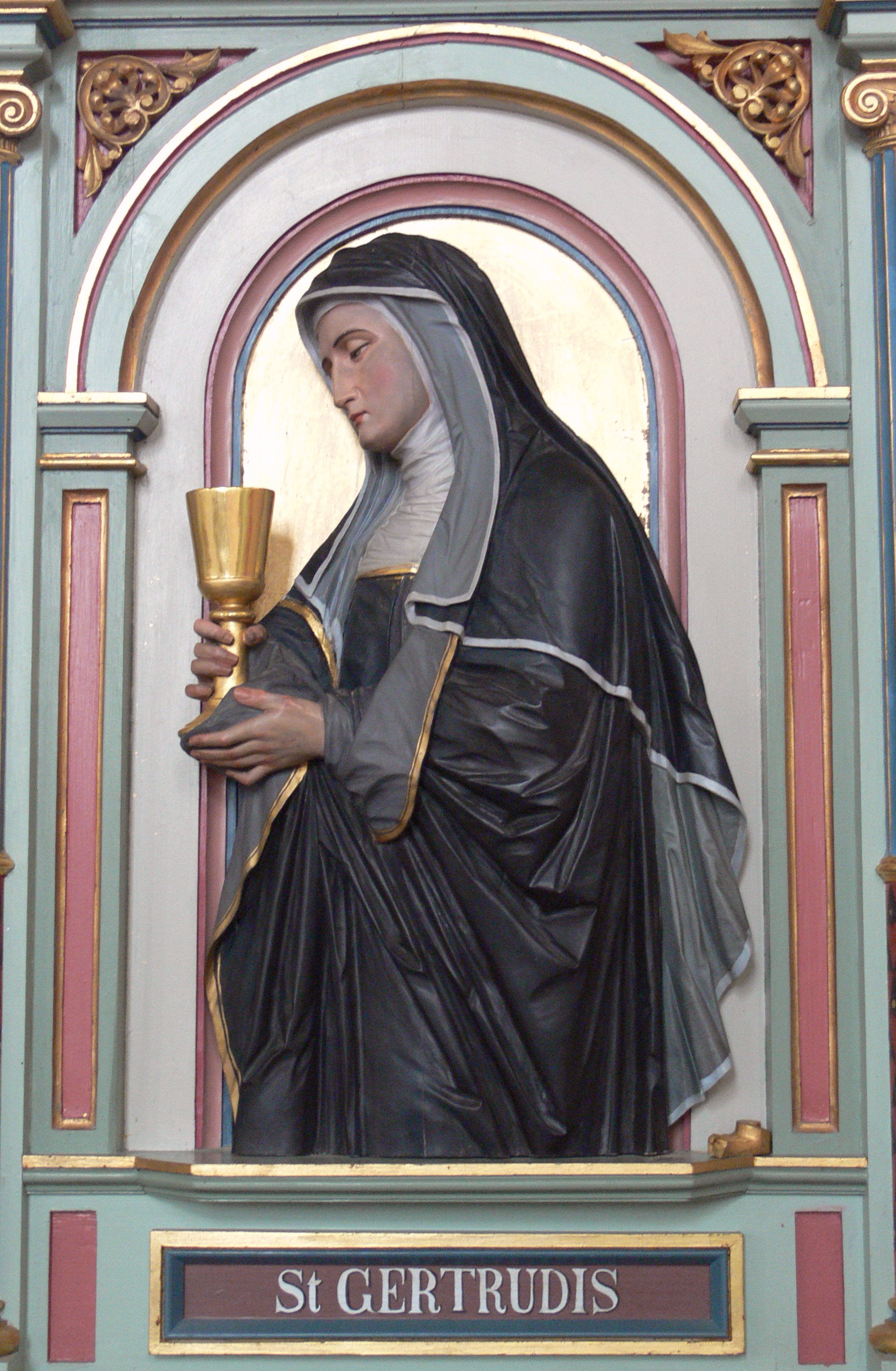 Kath. Pfarrkirche St. Gordian und Epimachus, Merazhofen, Stadt Leutkirch im Allgäu, Landkreis Ravensburg Chorgestühl, 1896, Bildhauer: Peter Paul Metz Gertrud von Helfta